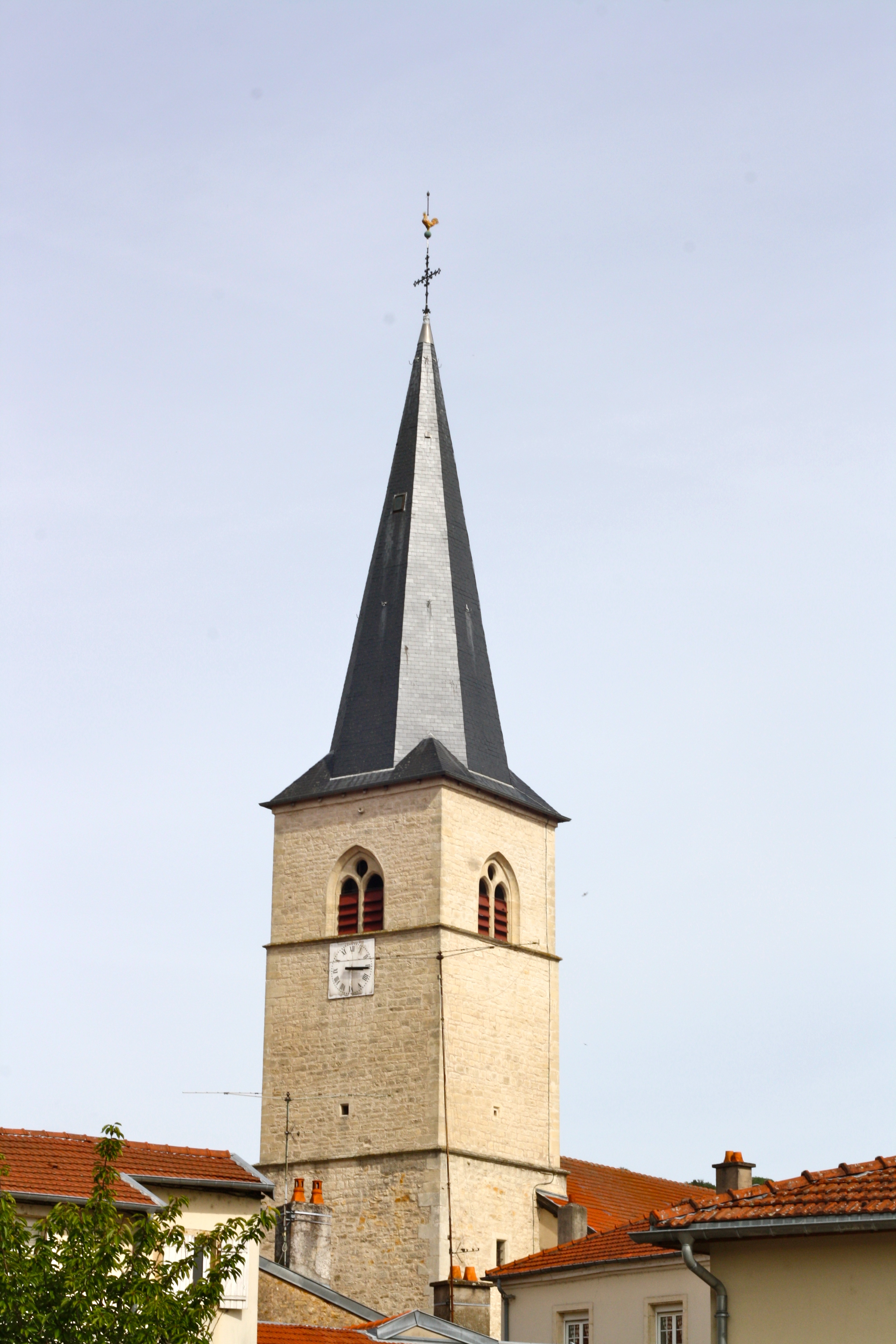 église de Lay-Saint-Christophe